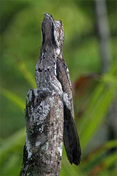 Nyctibius griseus; Aufnahme aus dem Süden Costa Ricas, südlich Ciudad Nelly, westlich der Panamerican